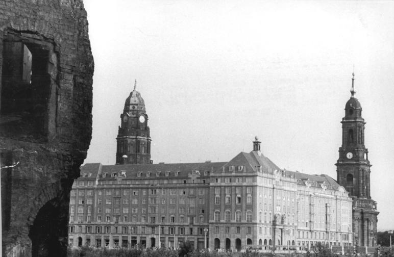 Dresden, Ernst-Thälmann-Straße, Neubauten Zentralbild Löwe 5.11.1958 Vom Aufbau der Stadt Dresden. Neu erbaute Wohnhäuser an der Thälmannstrasse, Ecke Altmarkt. (links) der Rathausturm, (r.) die Kreuzkirche, (im Vordergrund) die Ruine des ehemaligen Schlosses.